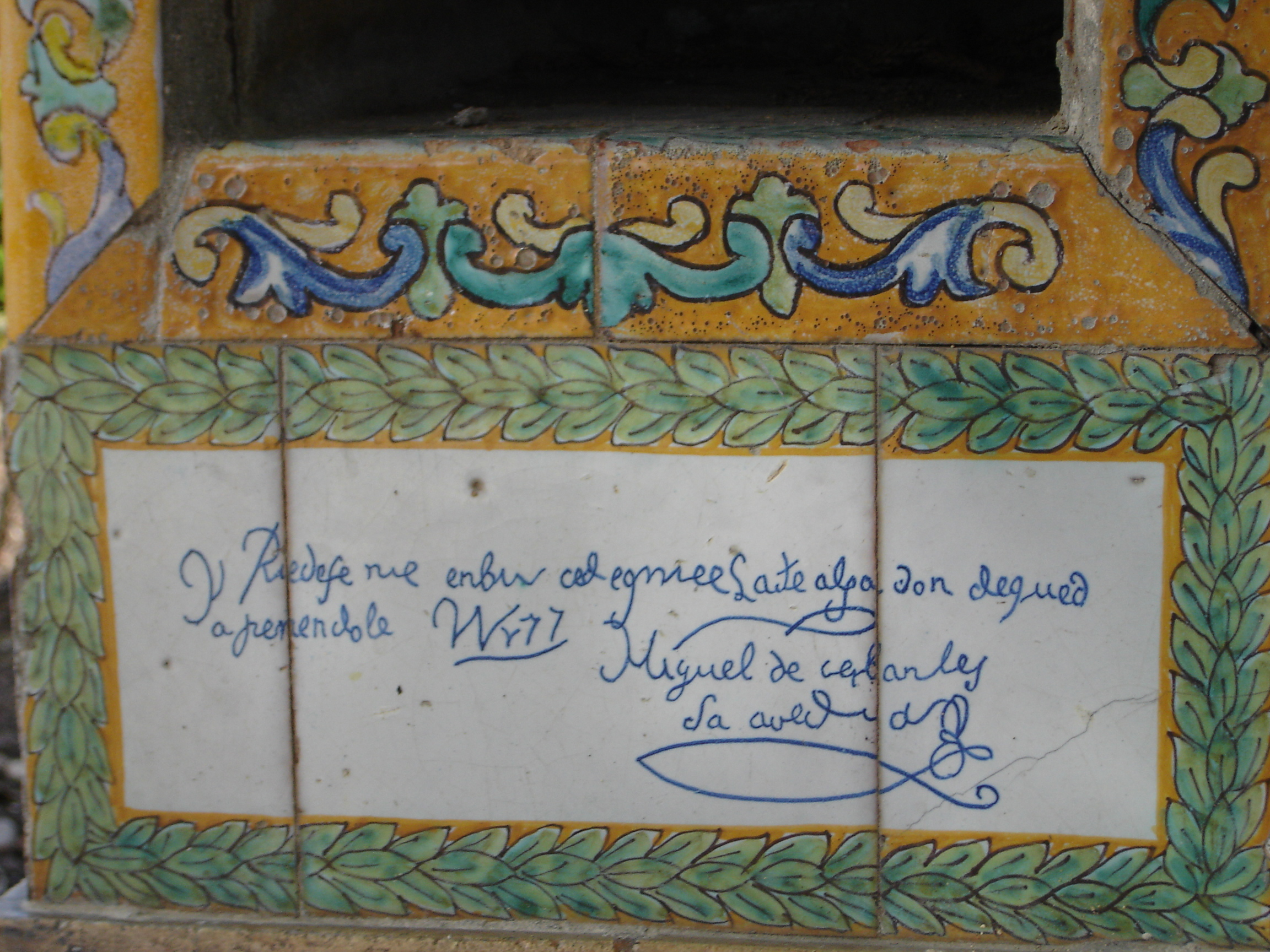 Glorieta de Cervantes, en el Parque de María Luisa (Sevilla). Anaquel con firma del homenajeado. Realización propia.